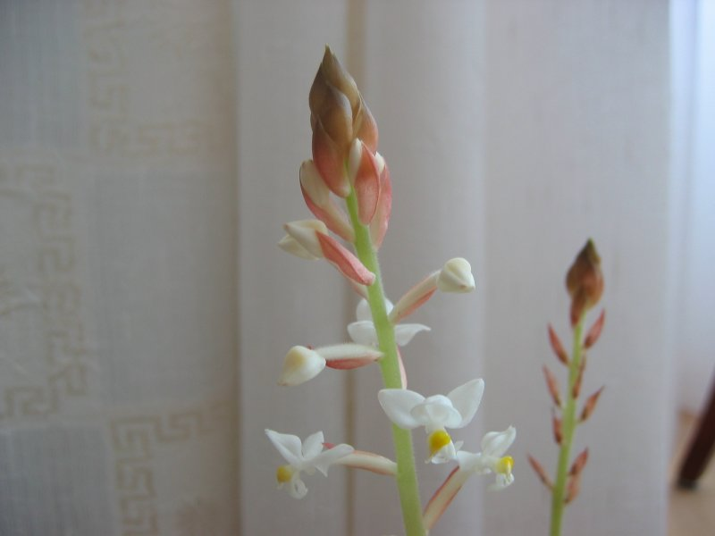 Zimmer-Orchidee Ludisia discolor